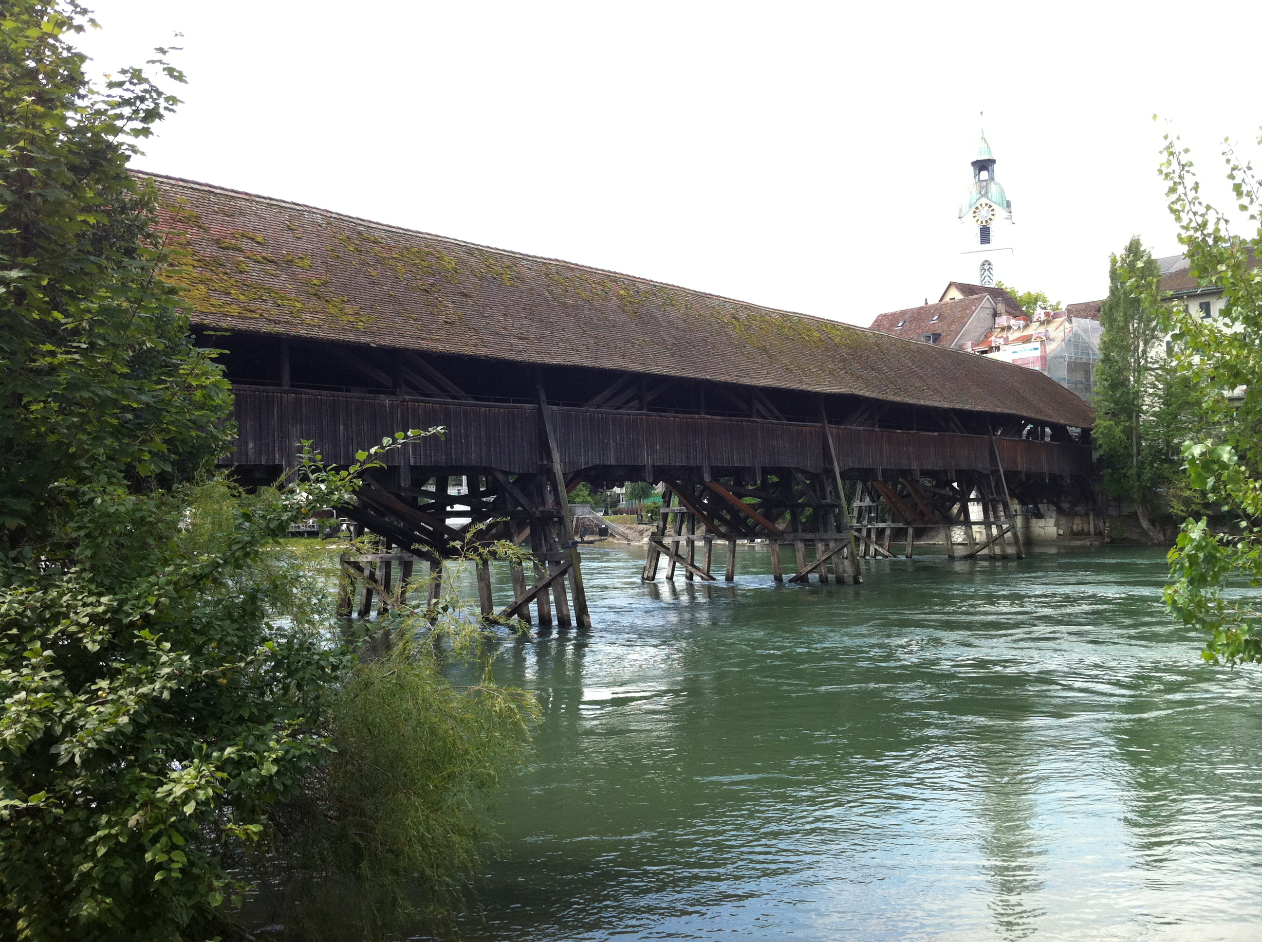 Holzbrücke über die Aare in Olten